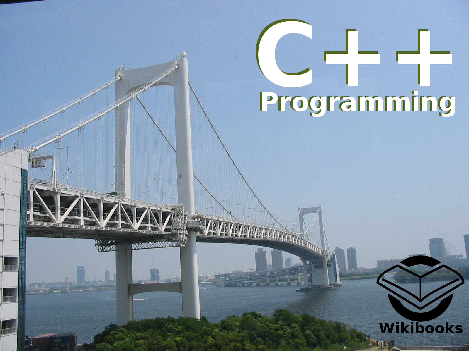 Cover for C++ Programming Wikibook